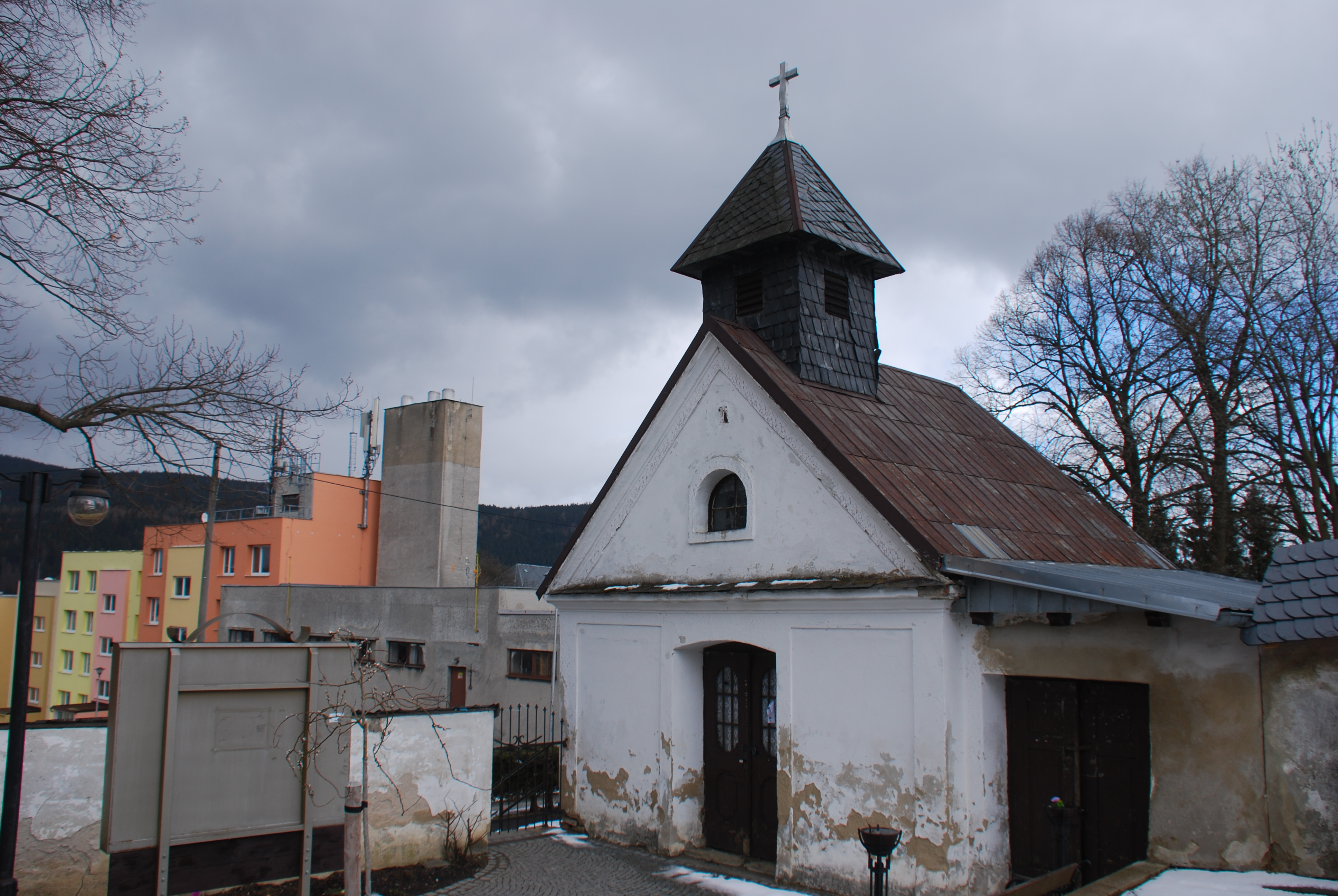 Hřbitovní kaple, Vrbno pod Pradědem.